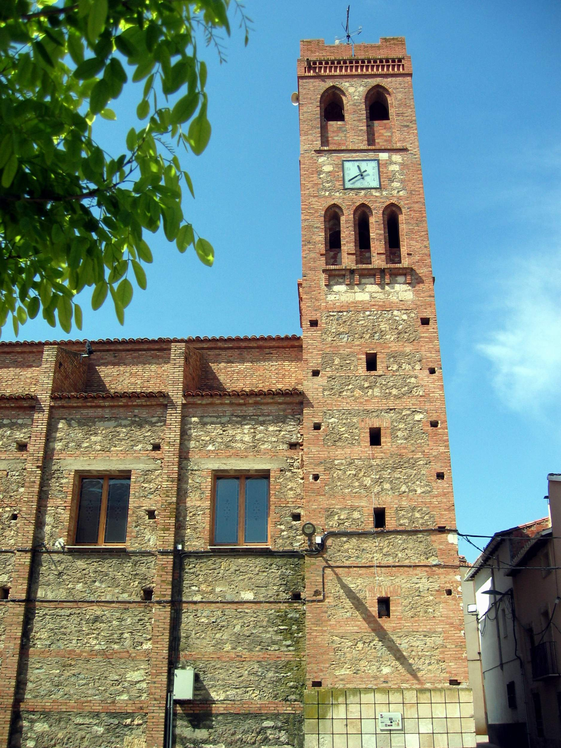 Vista parcial de la iglesia parroquial de Torrebaja (Valencia), con detalle de la torre-campanario (2008).